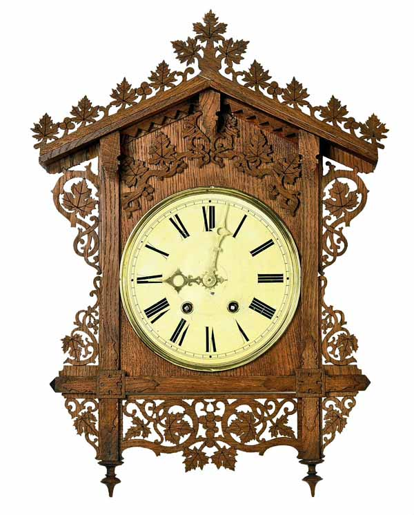 Bahnhäusleuhr nach dem Originalentwurf von Friedrich Eisenlohr, Kreuzer, Glatz & Co., Furtwangen, ca. 1853/54 (Deutsches Uhrenmuseum, Inv. 2003-081)